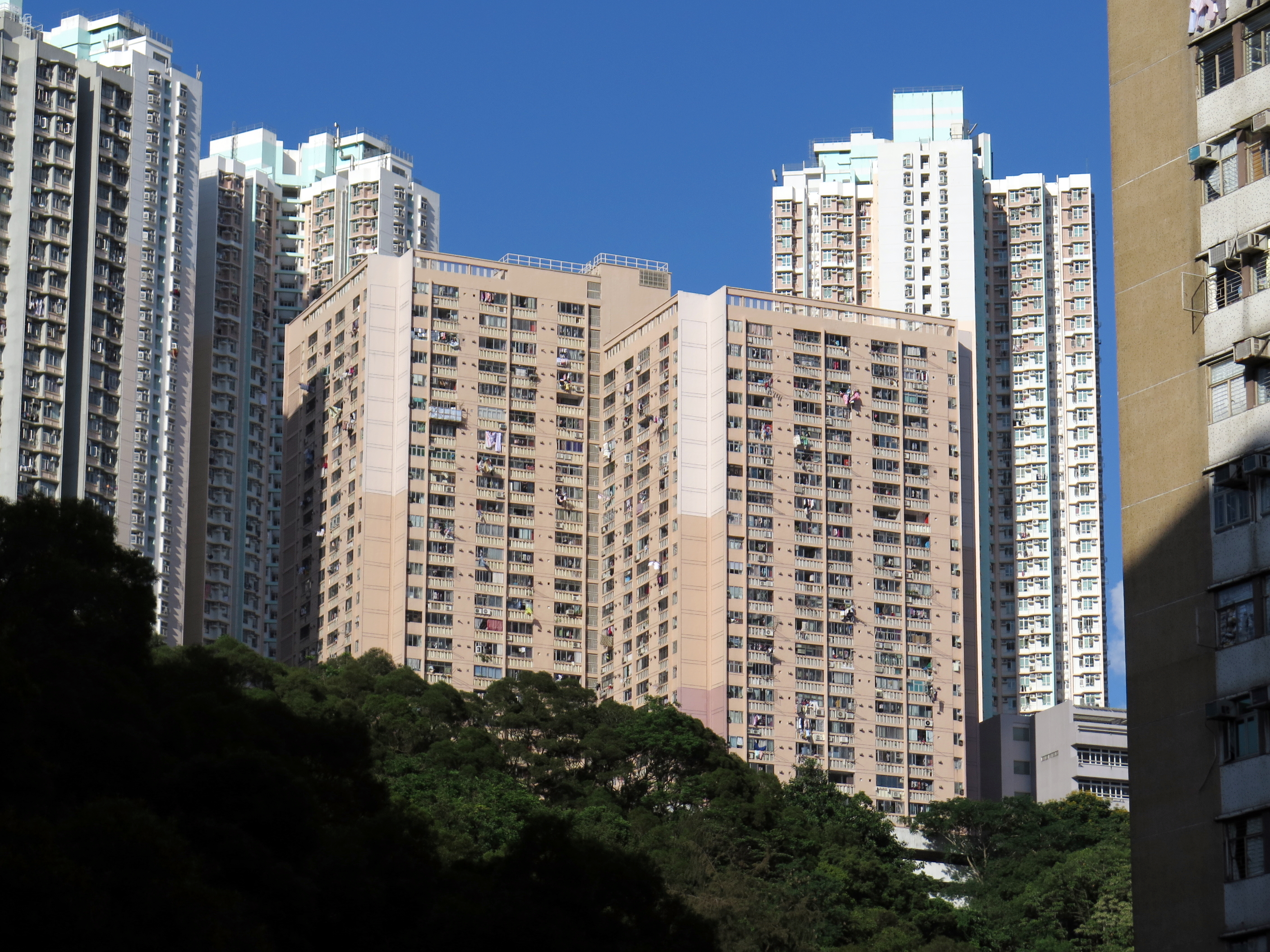 Sau Mau Ping Estate Sau Ming House